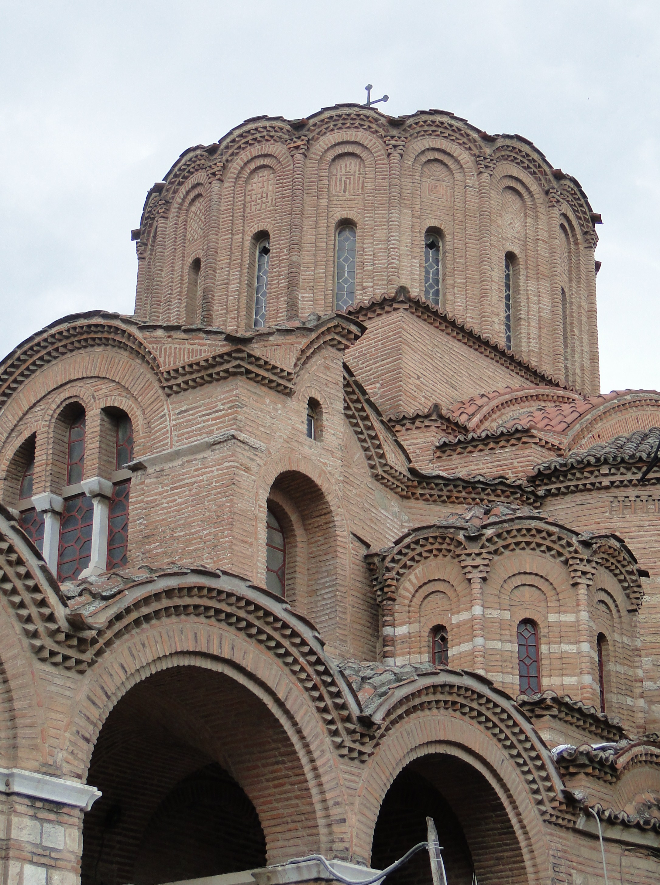 De kerk van Profitis Ilias in Thessaloniki.